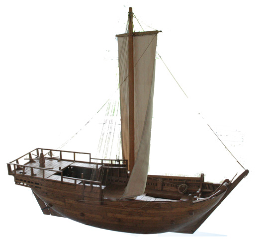 Modell der Bremer Kogge von 1380